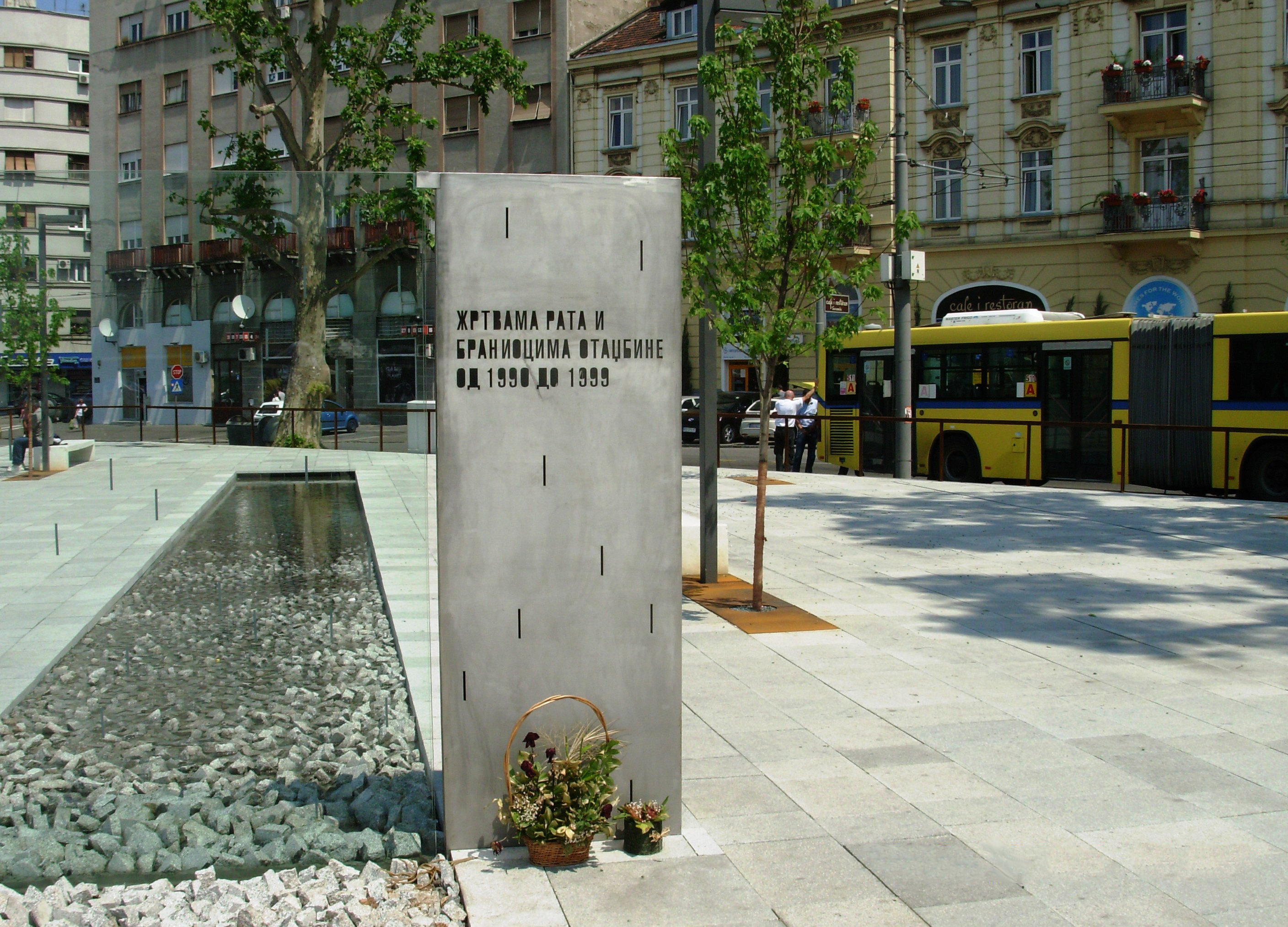 Spomenik žrtvama rata i braniocima otadžbine, posle dorade. Beograd, maja 2012. Slikao Goldfinger